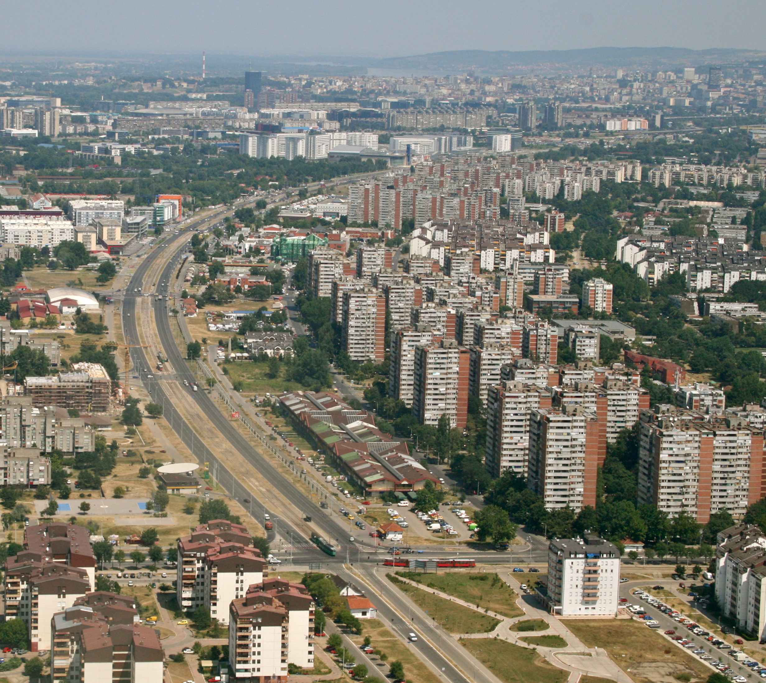 Улица Јурија Гагарина, Нови Београд